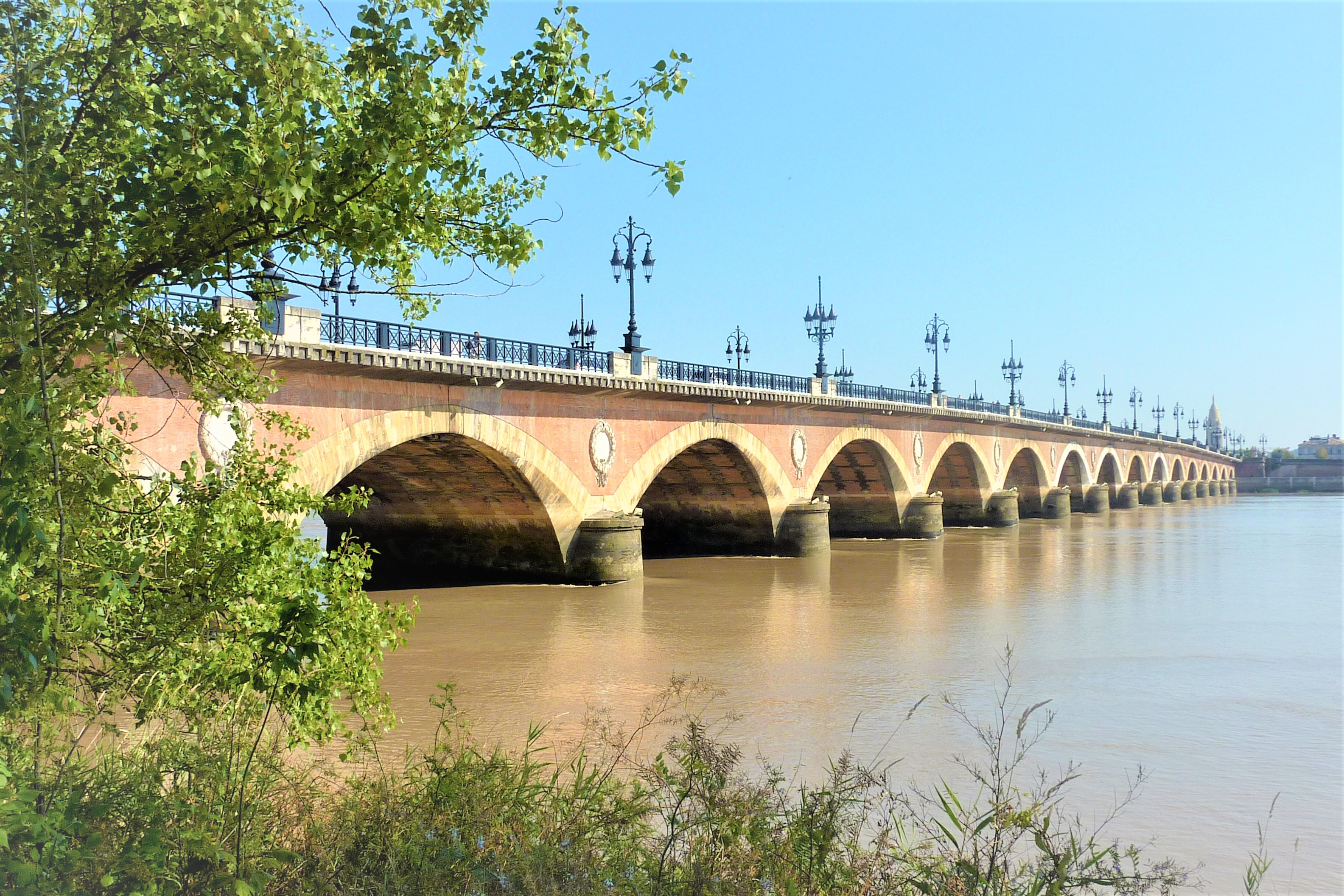 Pont de Pierre à Bordeaux (Gironde, France)